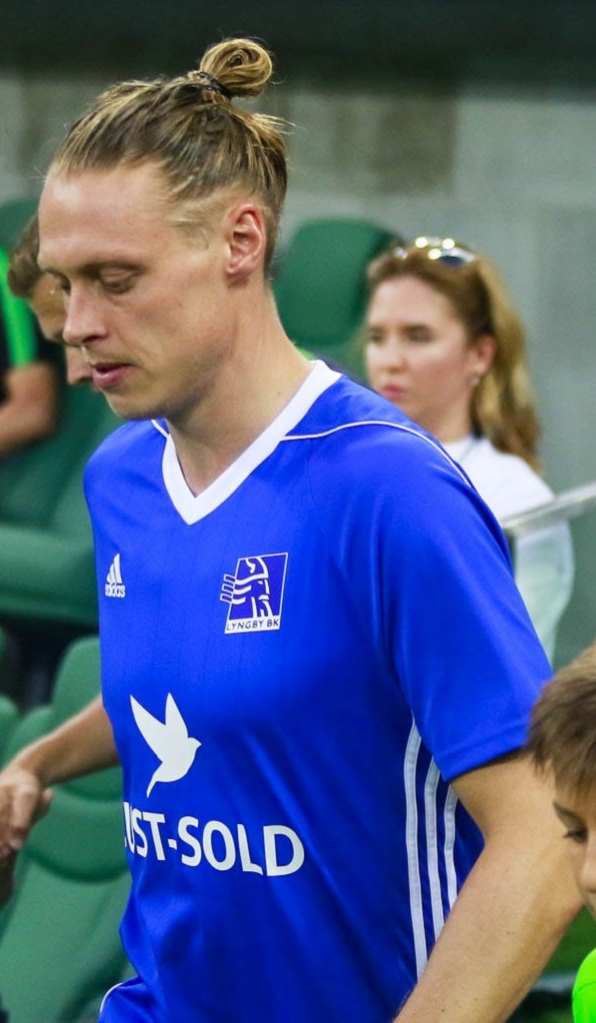 «Краснодар» - «Люнгбю»